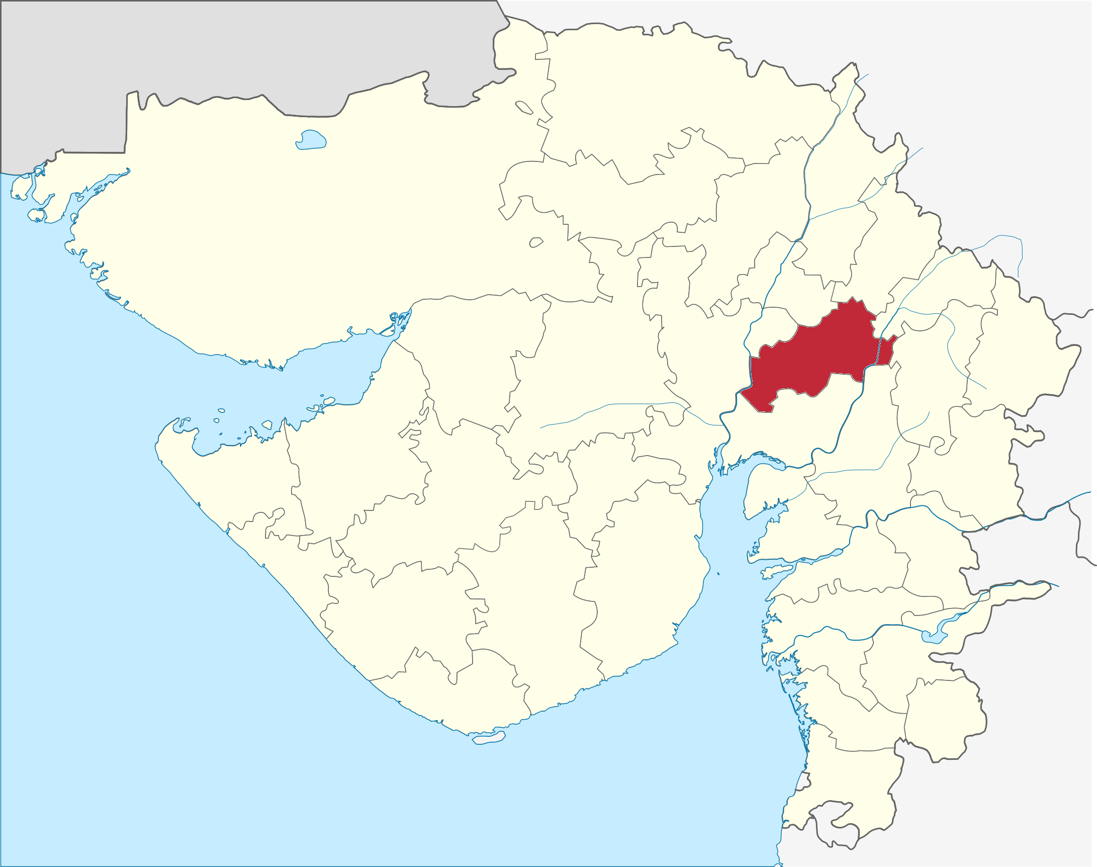 Distrito de Kheda en Gujarat